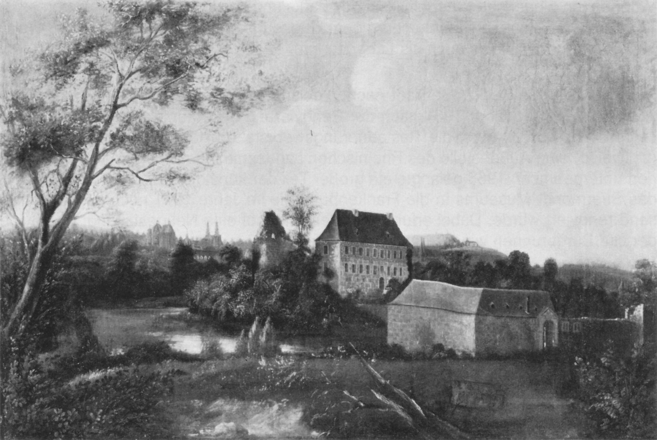 Ölgemälde der Burg Frankenberg mit Wirtschaftshof und Blick auf Aachen